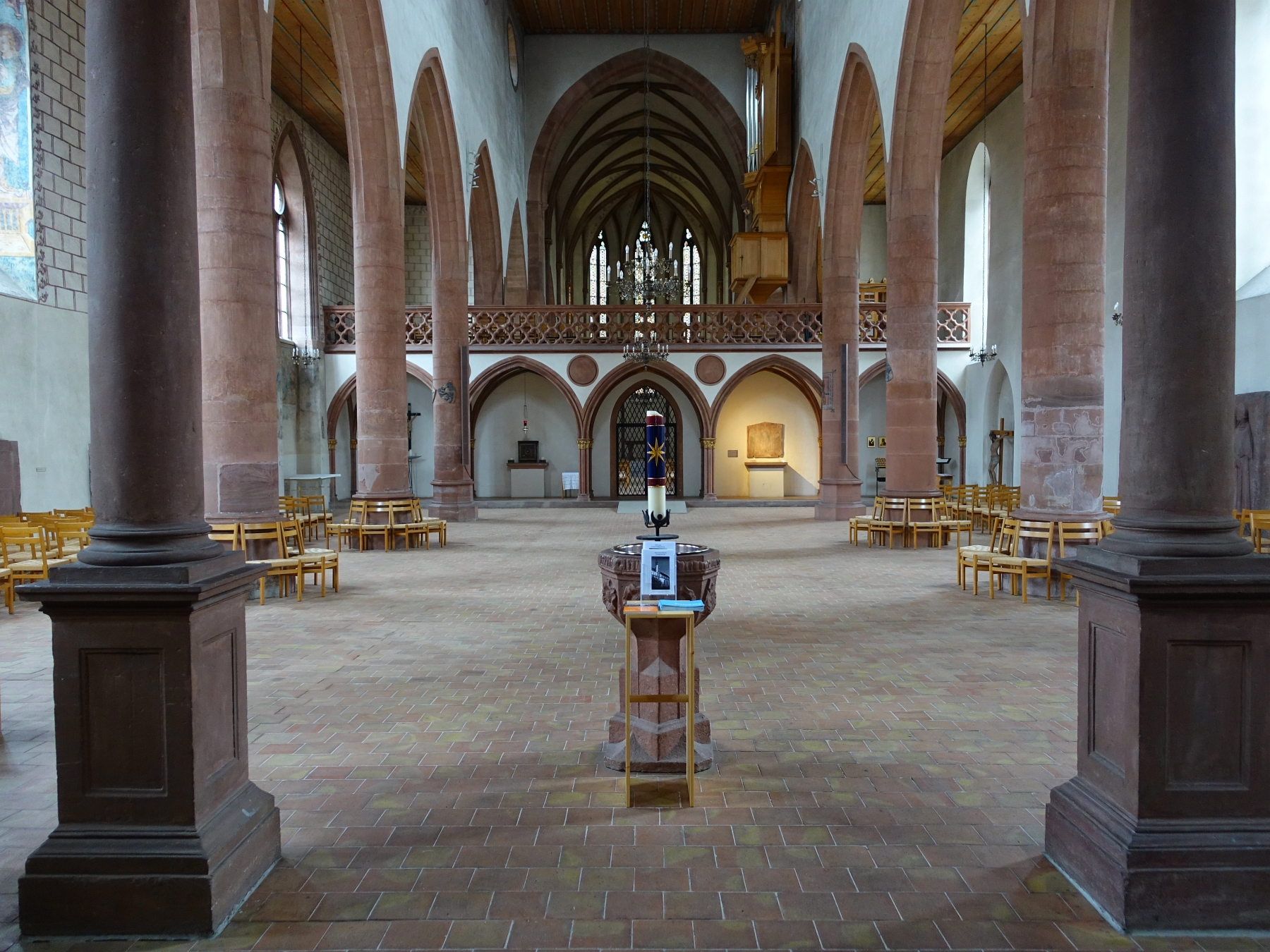 Altkatholische Predigerkirche, Basel